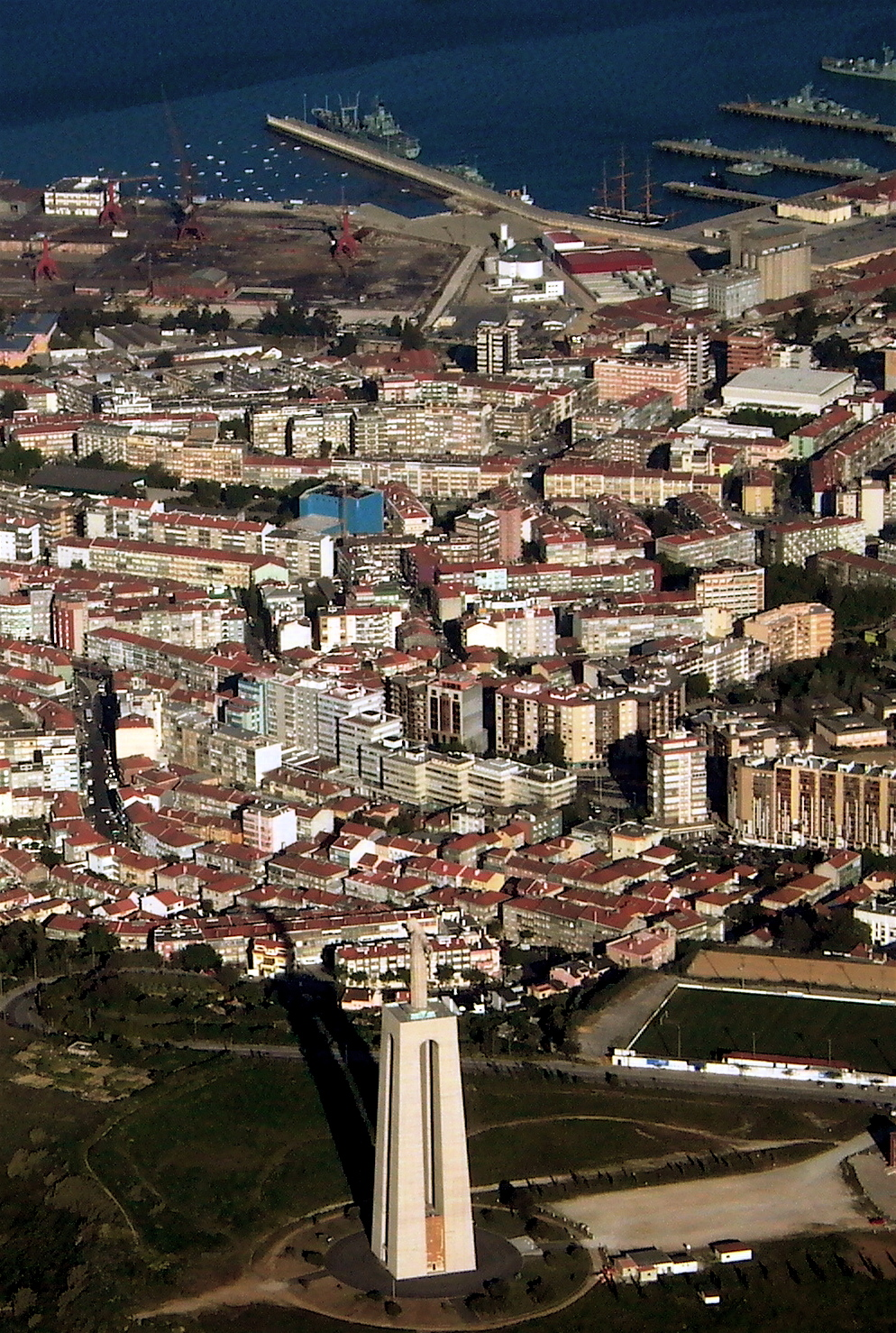 Vista de Almada e o Cristo Rei